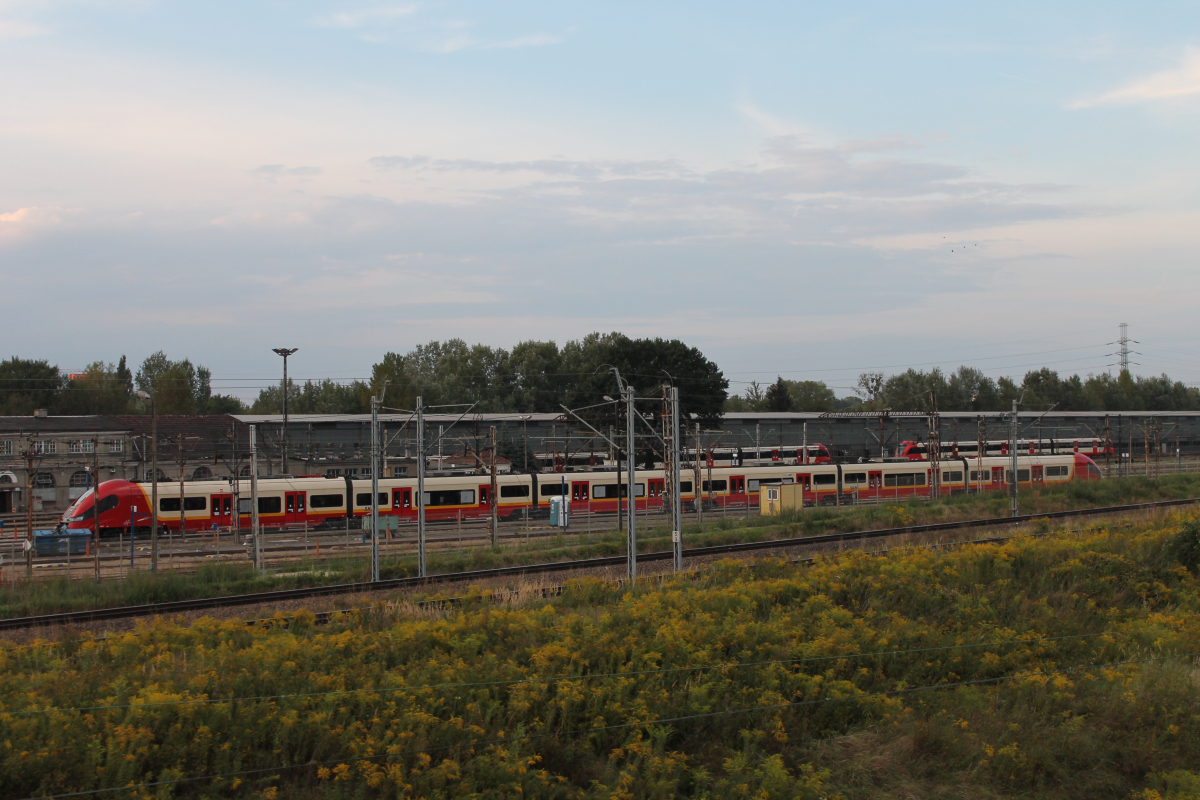 Tory odstawcze stacji postojowej Warszawa Szczęśliwice. This photo was taken during Railway Wikiexpedition 2014 set up by Wikimedia Polska Association in cooperation with Fundacja Grupy PKP. You can see all photographs in category Wikiekspedycja kolejowa 2014.